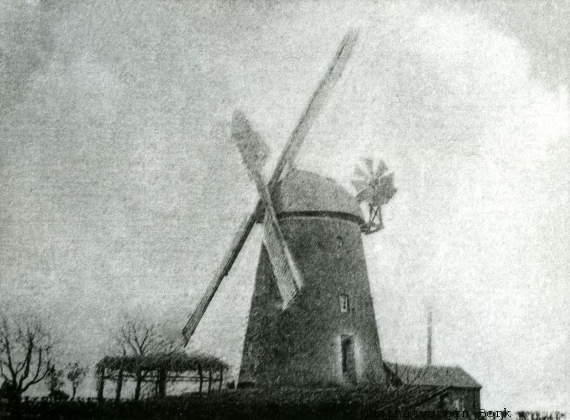 Windmühle Bork Hassel, erbaut 1856-57 durch Ferdinand Zangerl